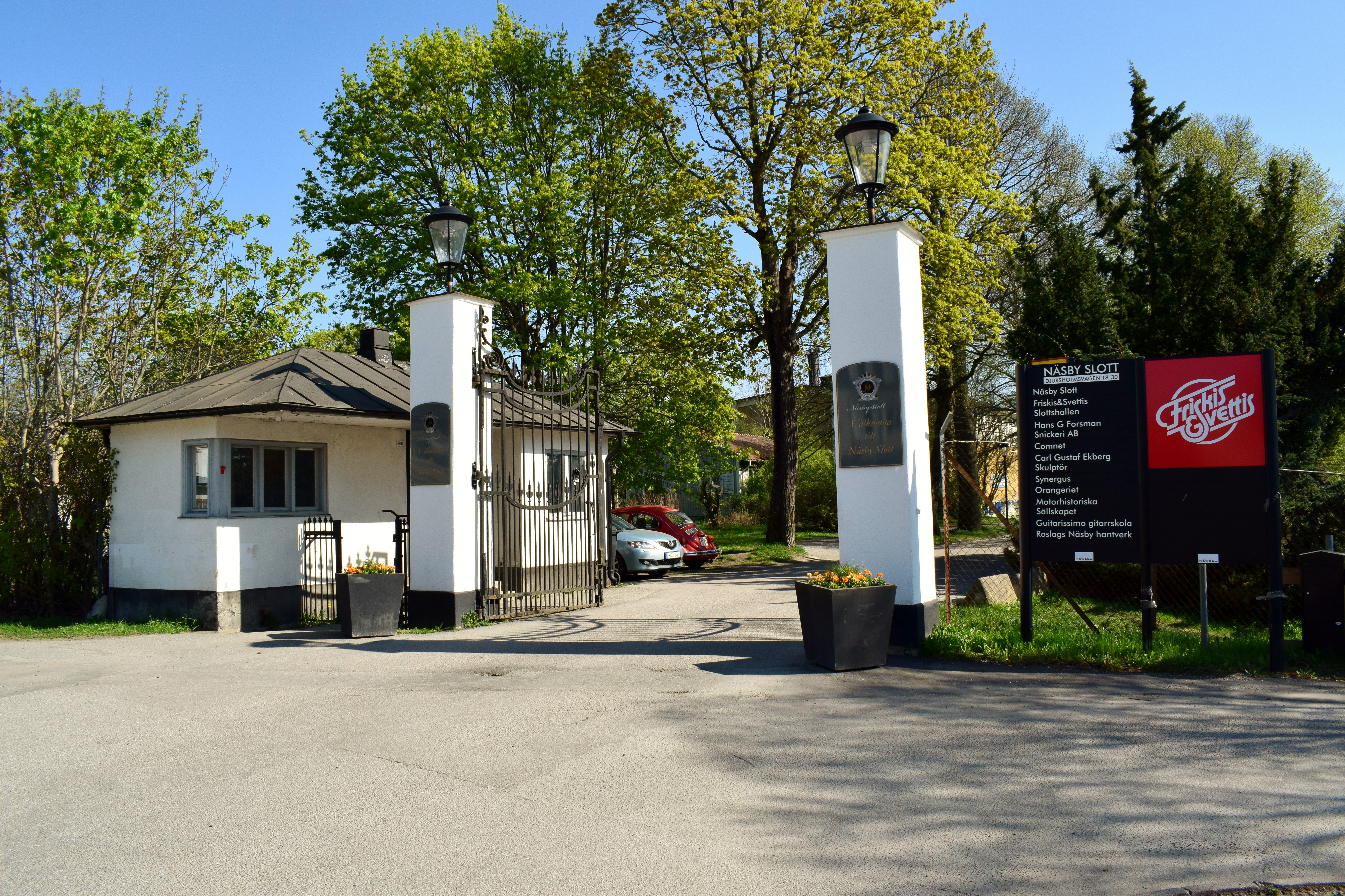 Före detta kasernvakten vid Näsbypark i Täby kommun.